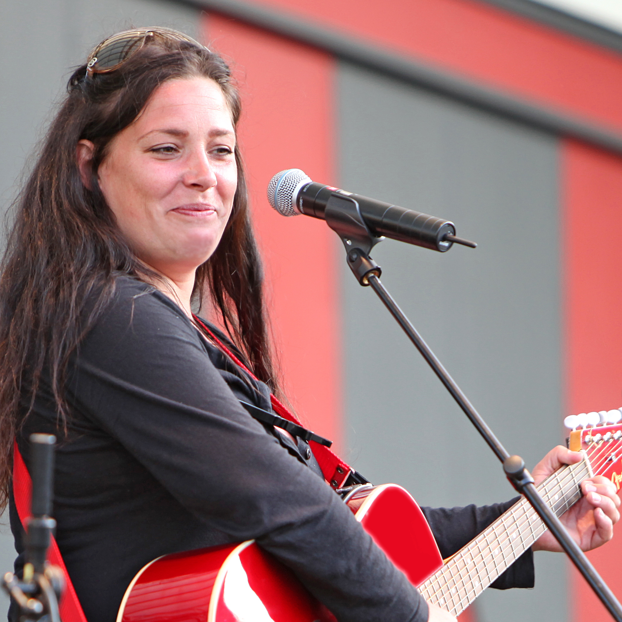 Sanna Carlstedt at Kungsträdgården, Stockholm 2009